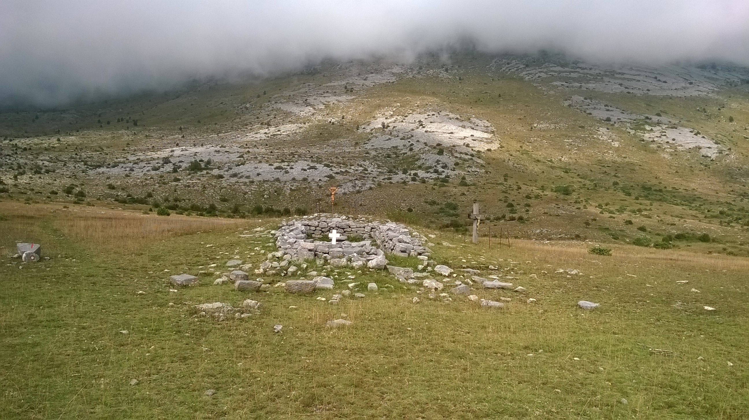 Temelji kapelice Sv. Ivana na Libinju